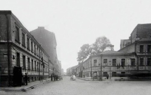 Даев переулок 1934–1935 годы